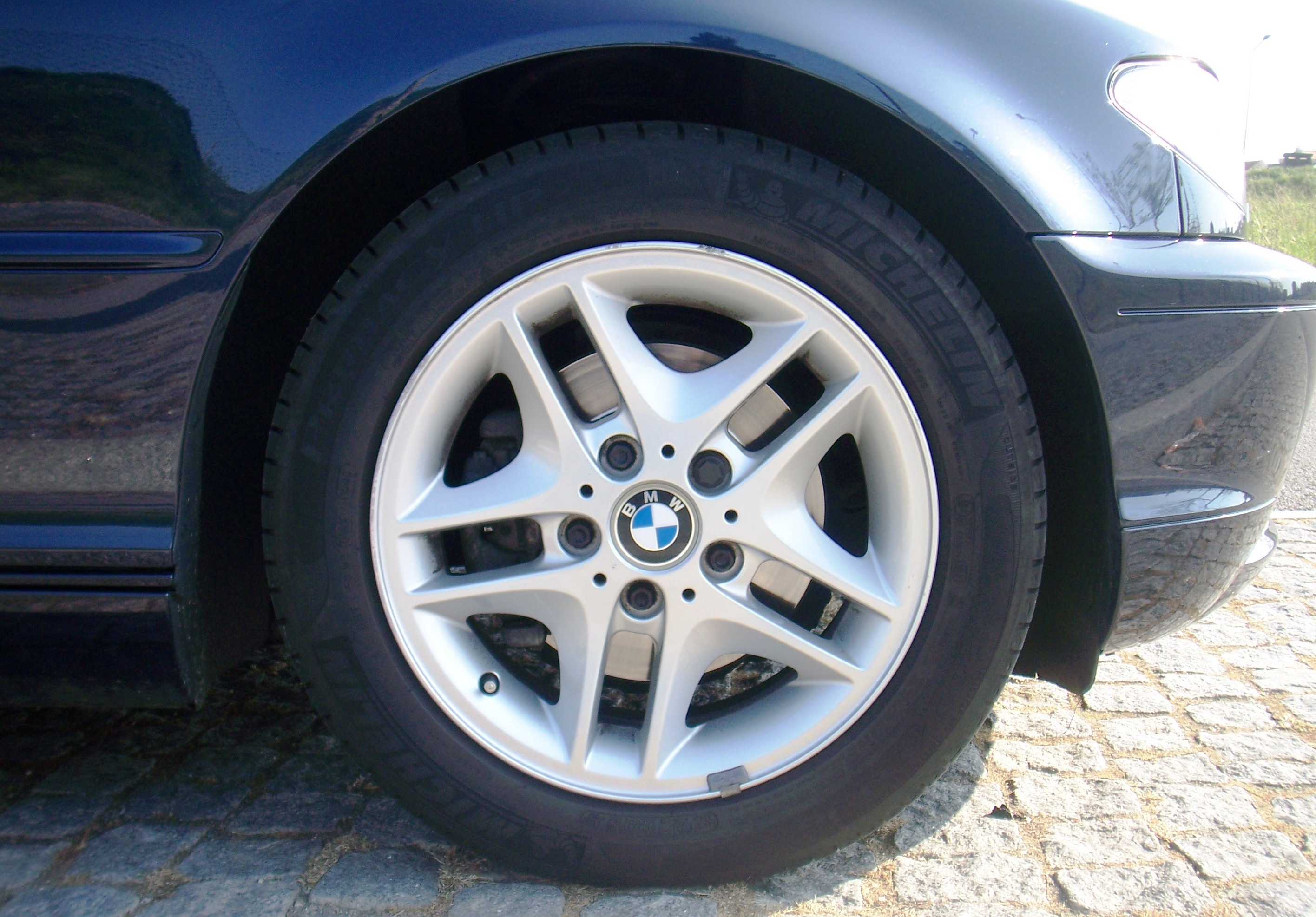 Pneu de um automóvel